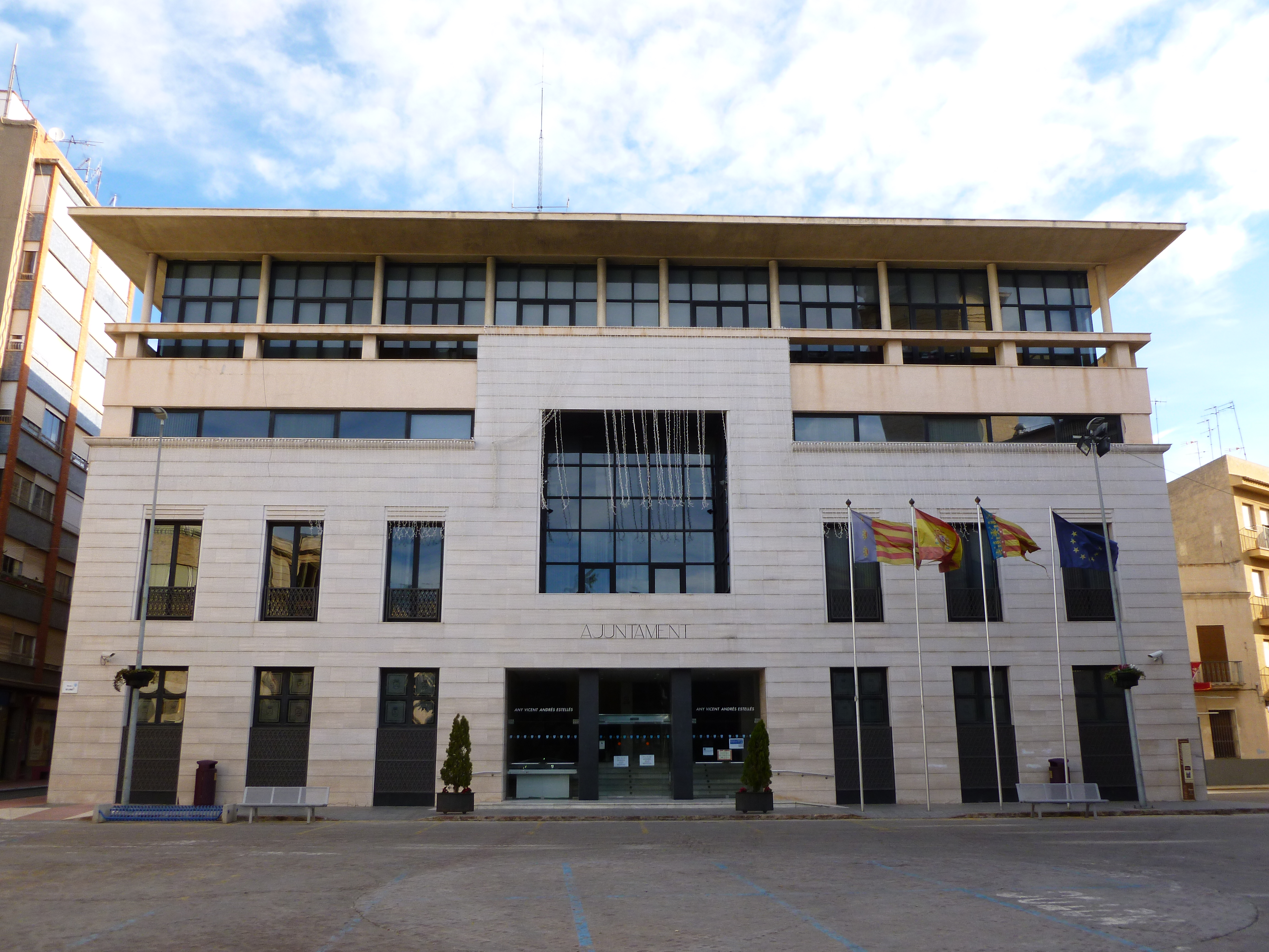 Ayuntamiento de Burriana (España)